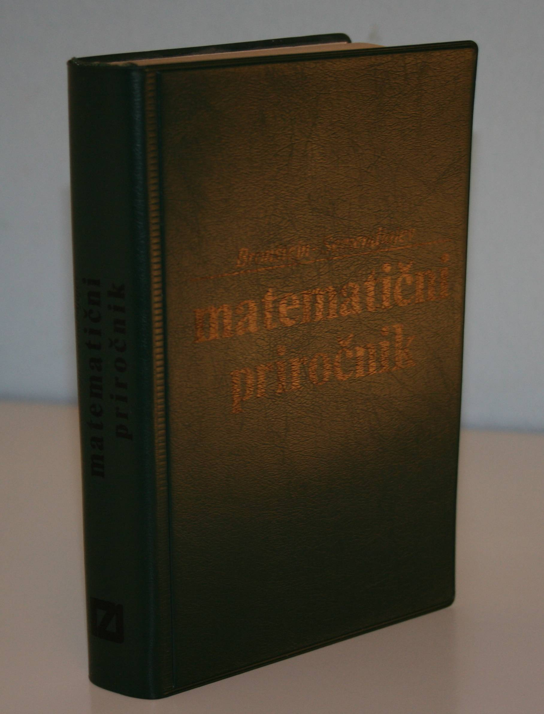 Bronštejn, Semendjajev, Matematični priročnik, Tehniška založba, Ljubljana 1978, 5. ponatis